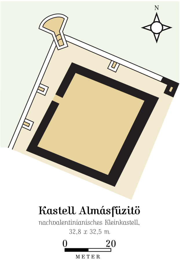 Kastell Almásfüzitő – nachvalentinianisches Restkastell auf dem Areal des Militäranlage aus der Zeit des Prinzipats. Quelle: Zolt Visy (Hsgr.): The Roman Army in Pannonia, Ausschnitt aus der Zeichnung auf S. 81.